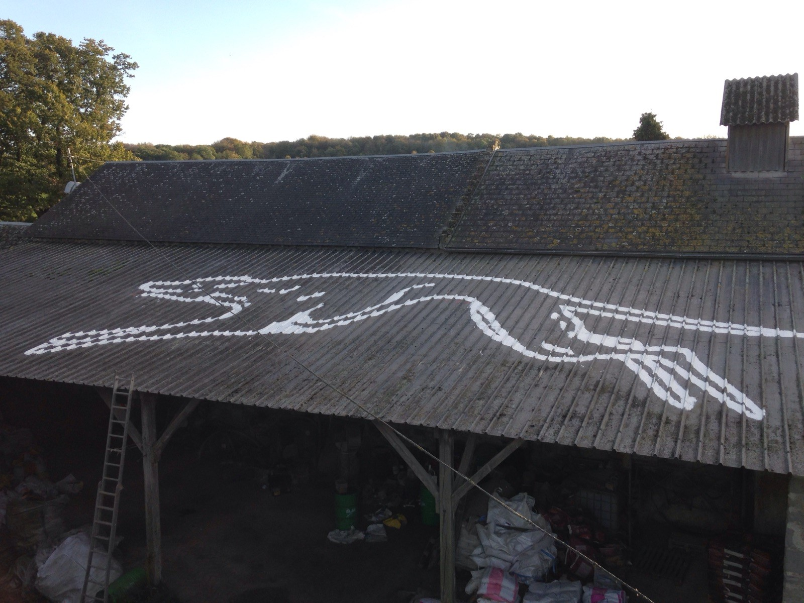 Une fresque de lévrier sur le toit d'un hangar